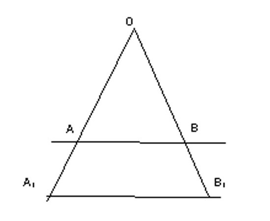 Систем сличних троуглова